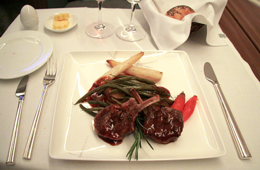 CX lamb chops